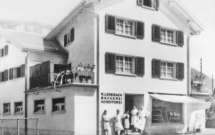 Erster Läderach Schoggi Laden in Glarus